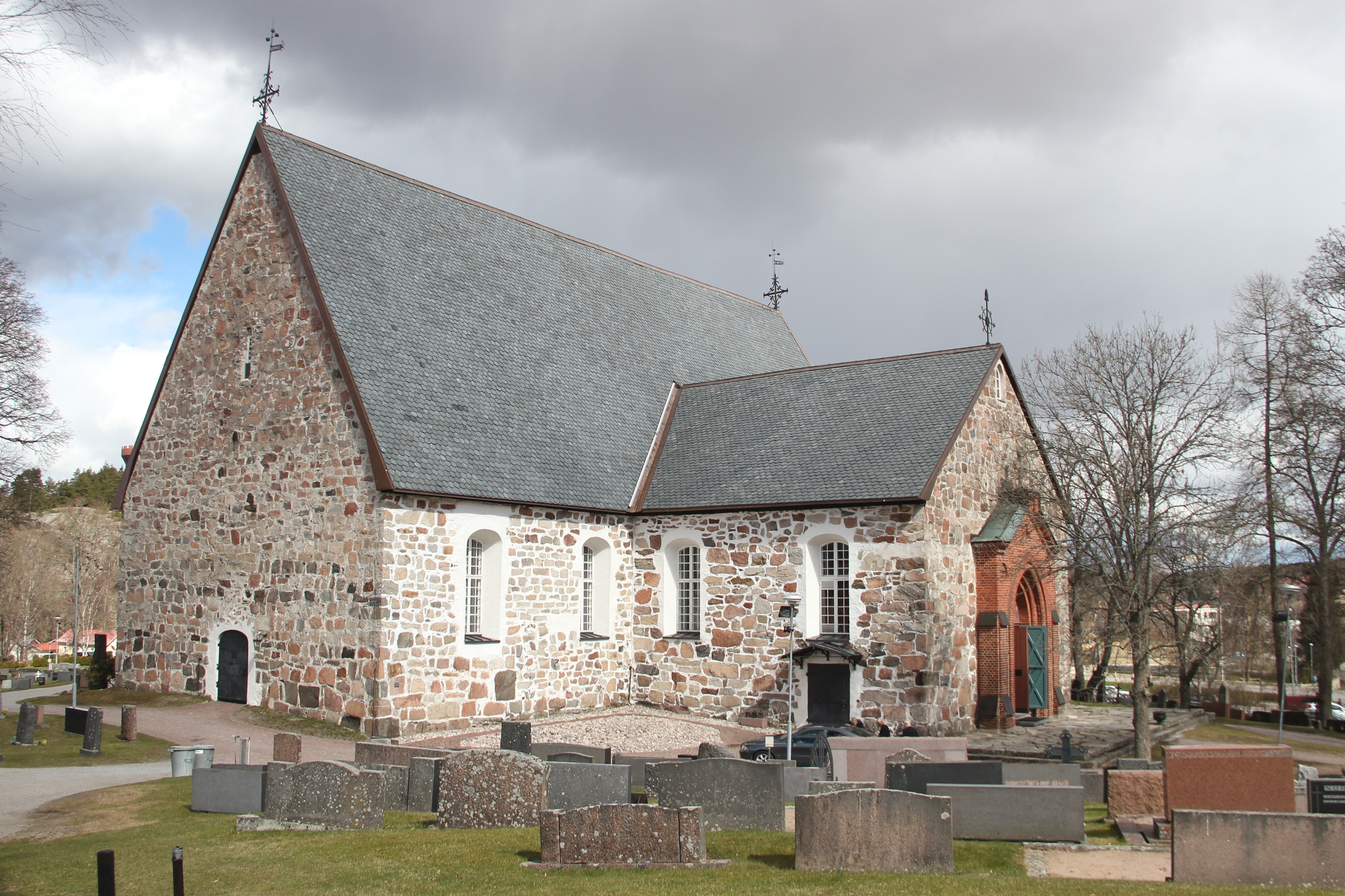 Halikon kirkko 2016 ulkoasun korjaustöiden jälkeen: kivikatto uusittu ja seinät kunnostettu